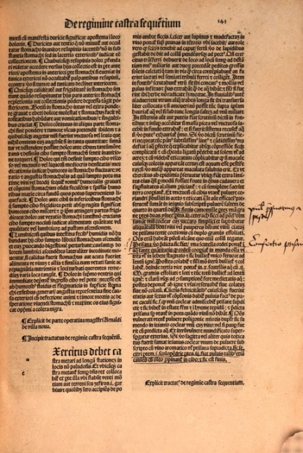 Arnaldus de Villa Nova, "De_regimine_castra_sequentium" in Opera (1504) f. 143r